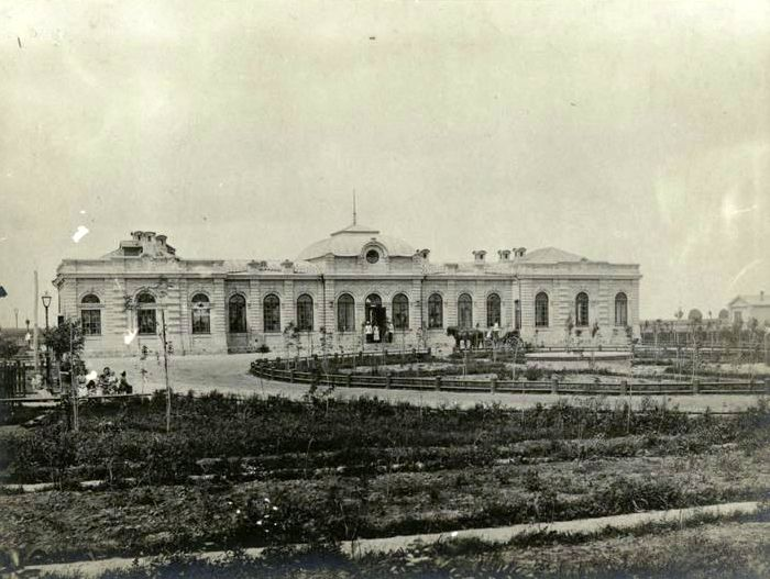 Пасажирська будівля станції Ромодан, поч. ХХ ст.